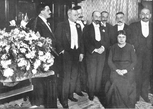 Fotografía que muestra a la actriz española Rosario Pino rodeada de diversos autores teatrales en un salón del Teatro de la Princesa con motivo de la función de despedida de la artista. De pie se puede ver a los hermanos Álvarez Quintero, Joaquín Dicenta, Jacinto Benavente, Gregorio Martínez Sierra, Miguel Ramos Carrión y Manuel Linares Rivas.